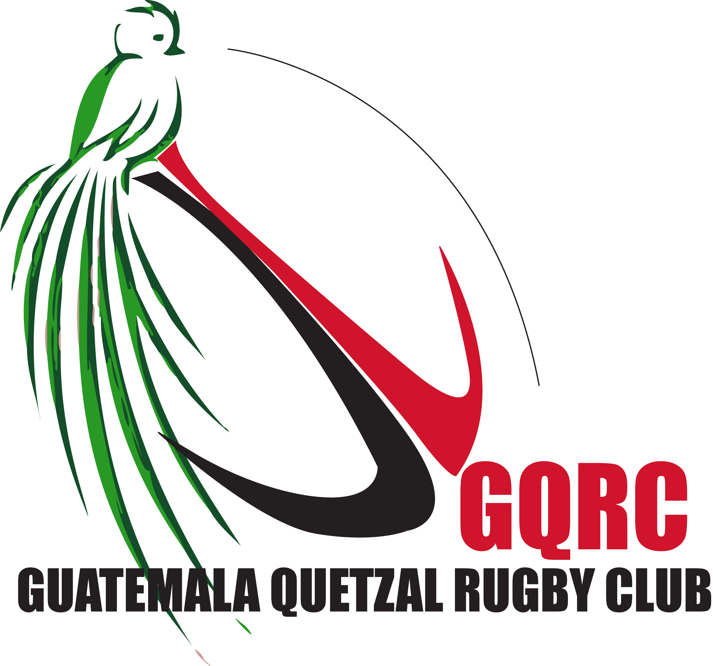 logo en alta resolución de GQRC